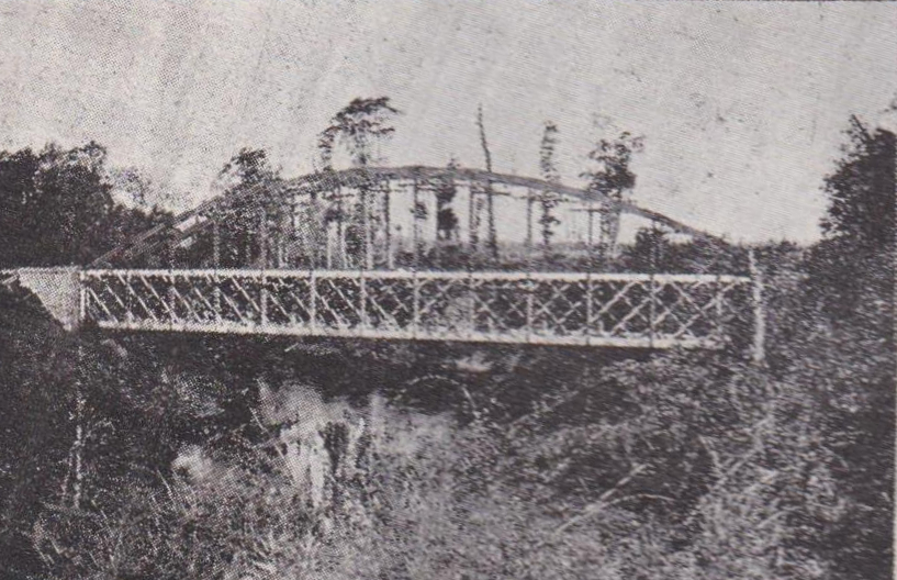 Puente Llollelhue. Circa 1929. Puente ubicado en la línea Santiago-Puerto Montt, entre las estaciones Los Canales y La Unión. Imagen obtenida a partir del libro (in Spanish) (1929) Ferrocarriles del Estado de Chile (3rd ed.), Santiago: Impr. Harris y Pascual